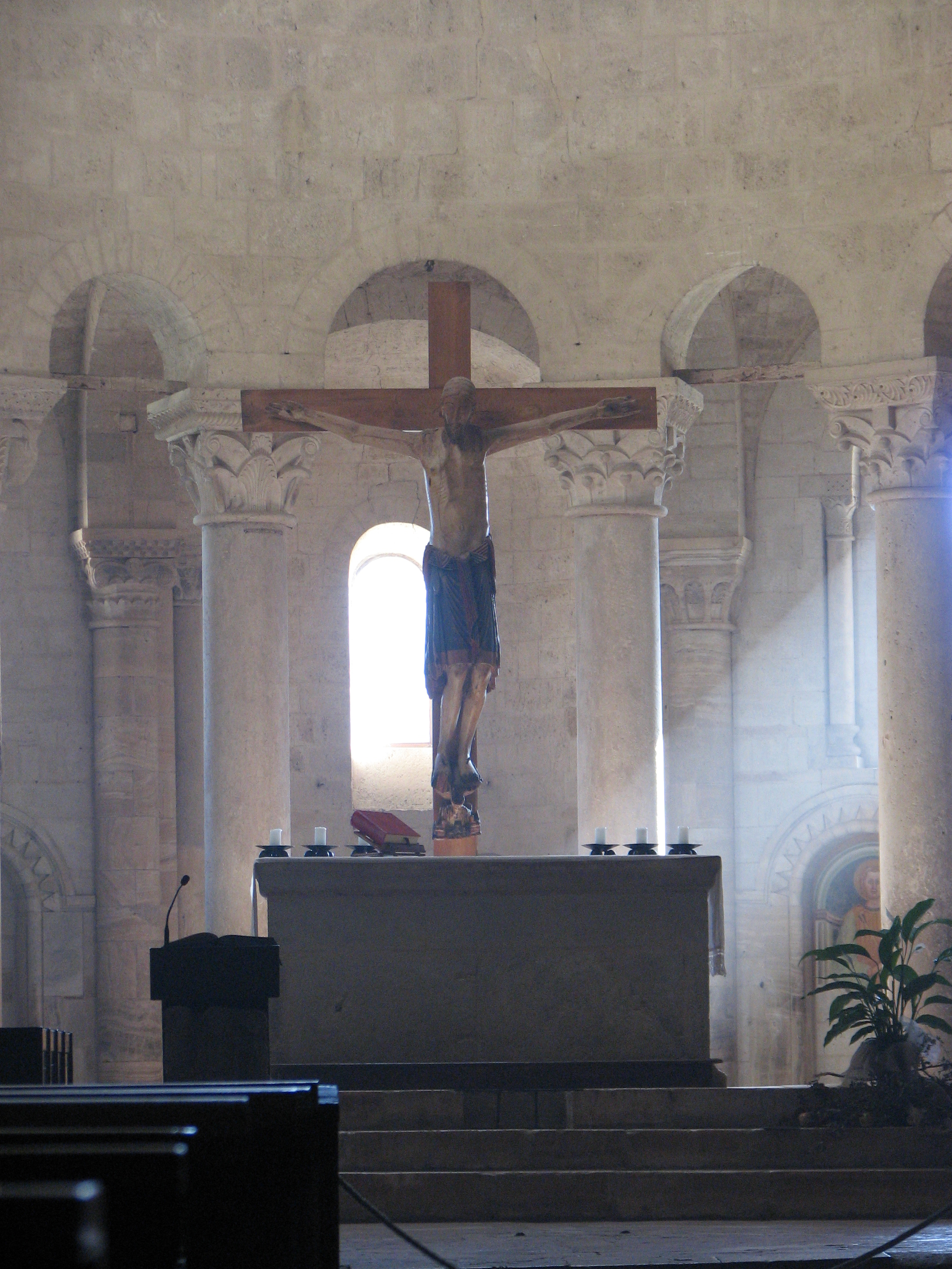 L'Abbazia di Sant'Antimo (Montalcino, Toscana, Italy) - Il crocifisso dell'altare maggiore